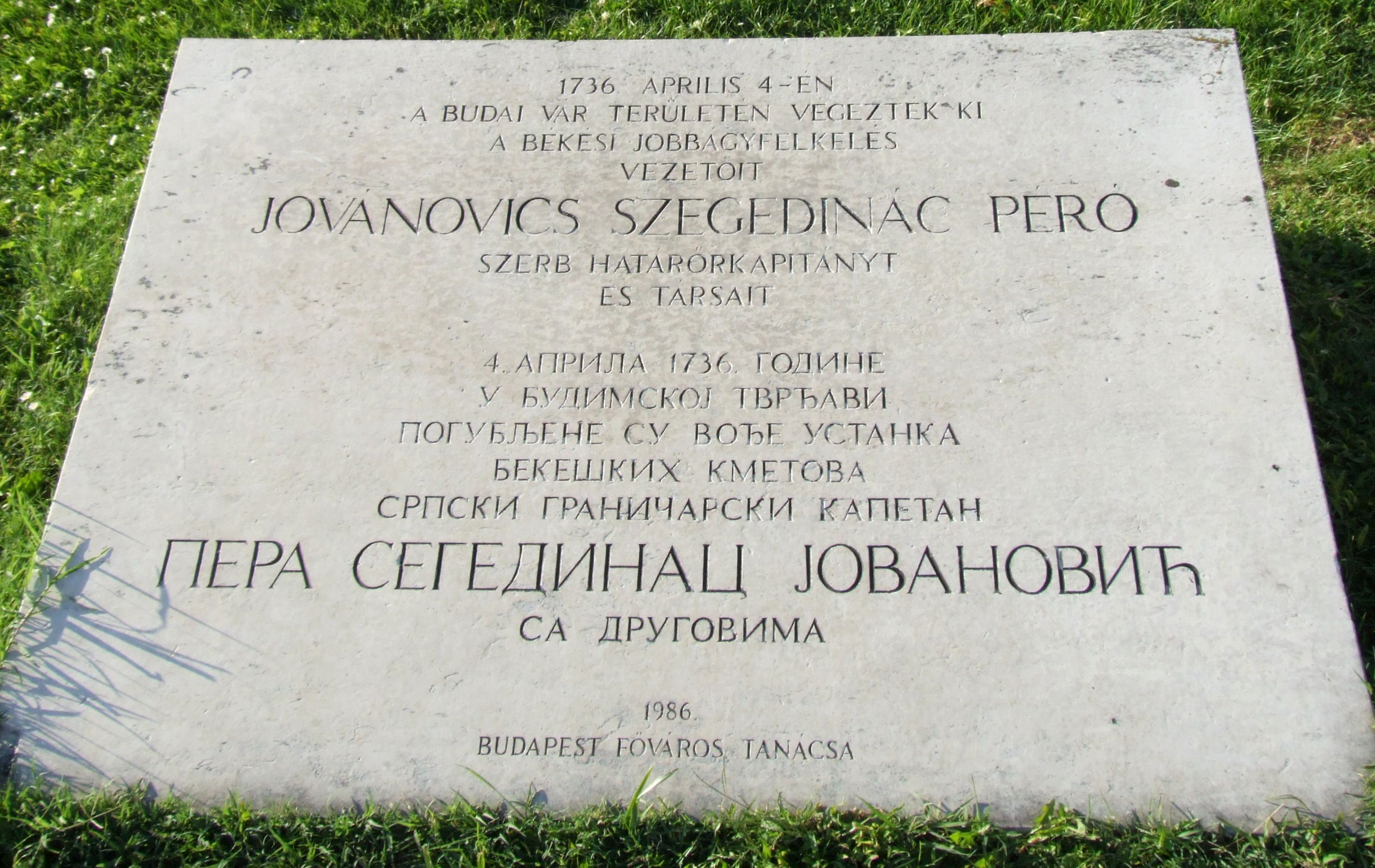 Jovanovics Szegedinac Pero emléktáblája. Budapest I. kerület, Szent György tér.